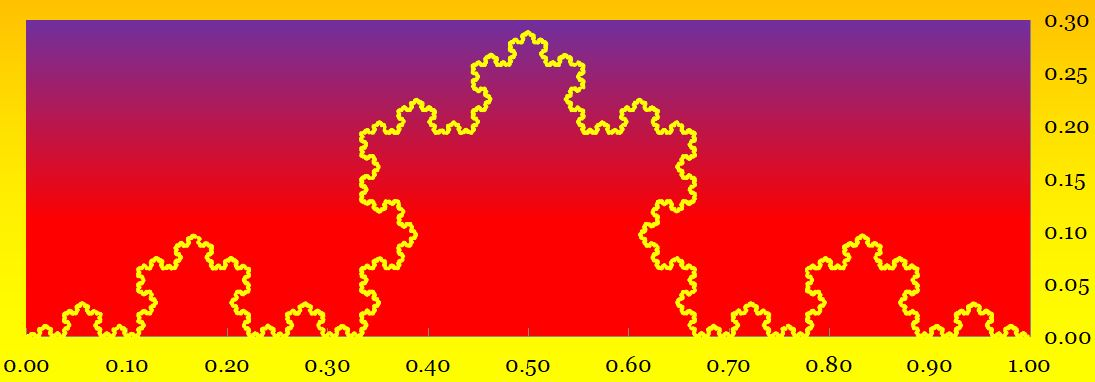 表計算ソフトで描画したコッホ曲線、1万点のデータ。